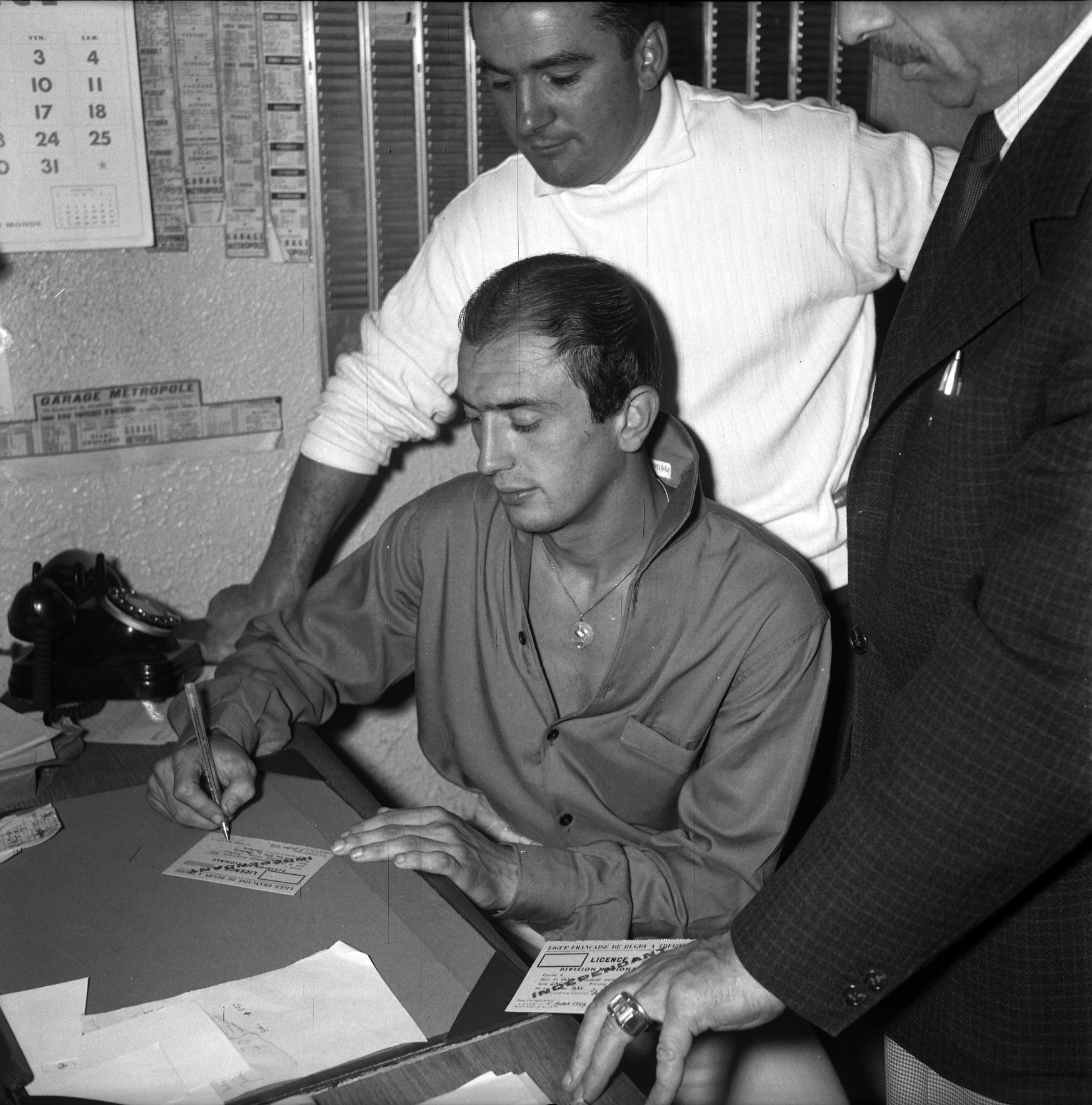 1er juillet 1959. Pierre Lacaze, surnommé "Papillon" vient de signer avec le club Toulouse Olympique XIII (rugby à XIII). Plan rapproché sur le joueur qui signe sa licence ; deux hommes l'entourent (président du club?).